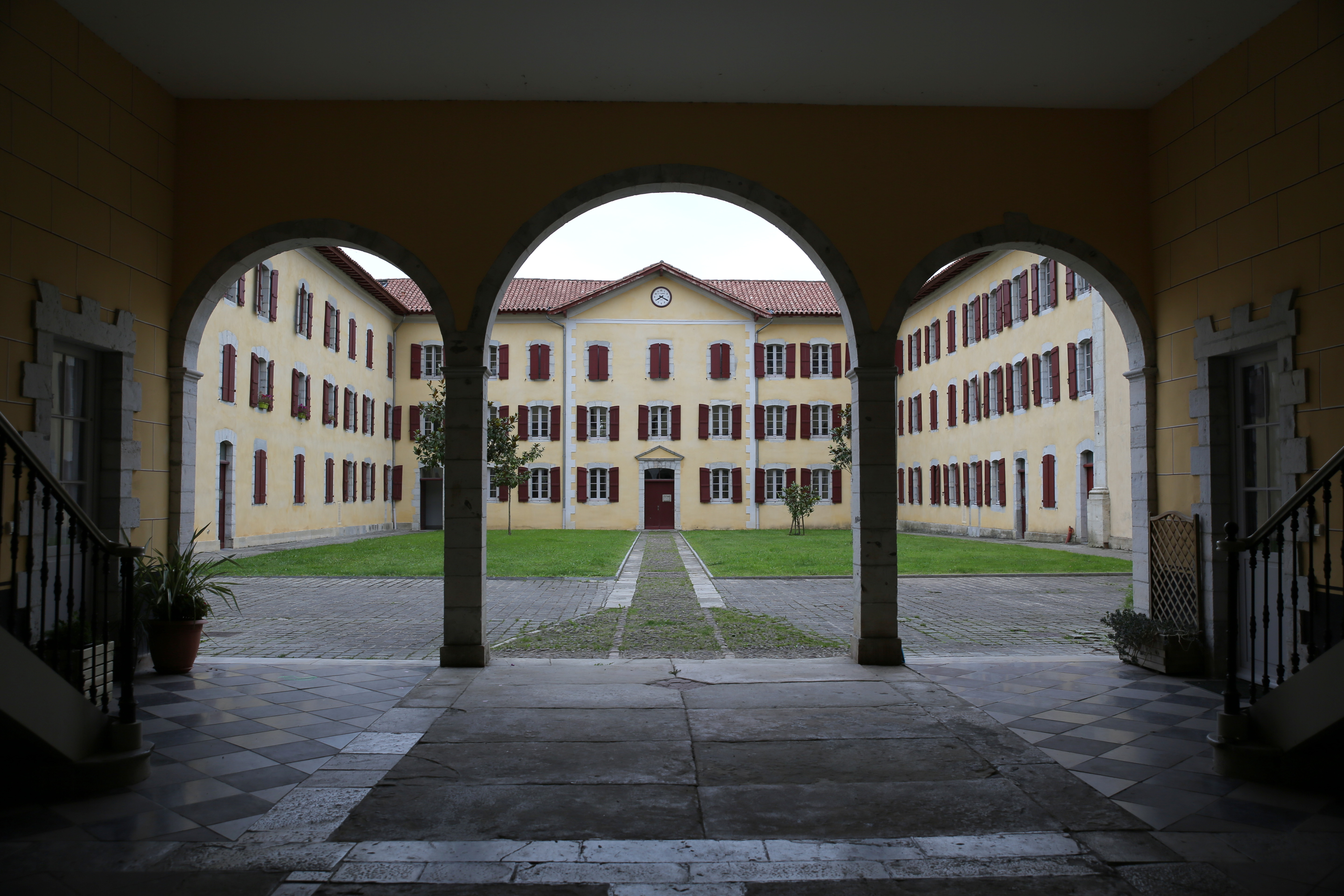 Séminaire de Larressorechapelle, pont, terrasse, escalier, décor intérieur, ancien séminaire This building is indexed in the Base Mérimée, a database of architectural heritage maintained by the French Ministry of Culture, under the references PA64000055 and classé+inscrit .